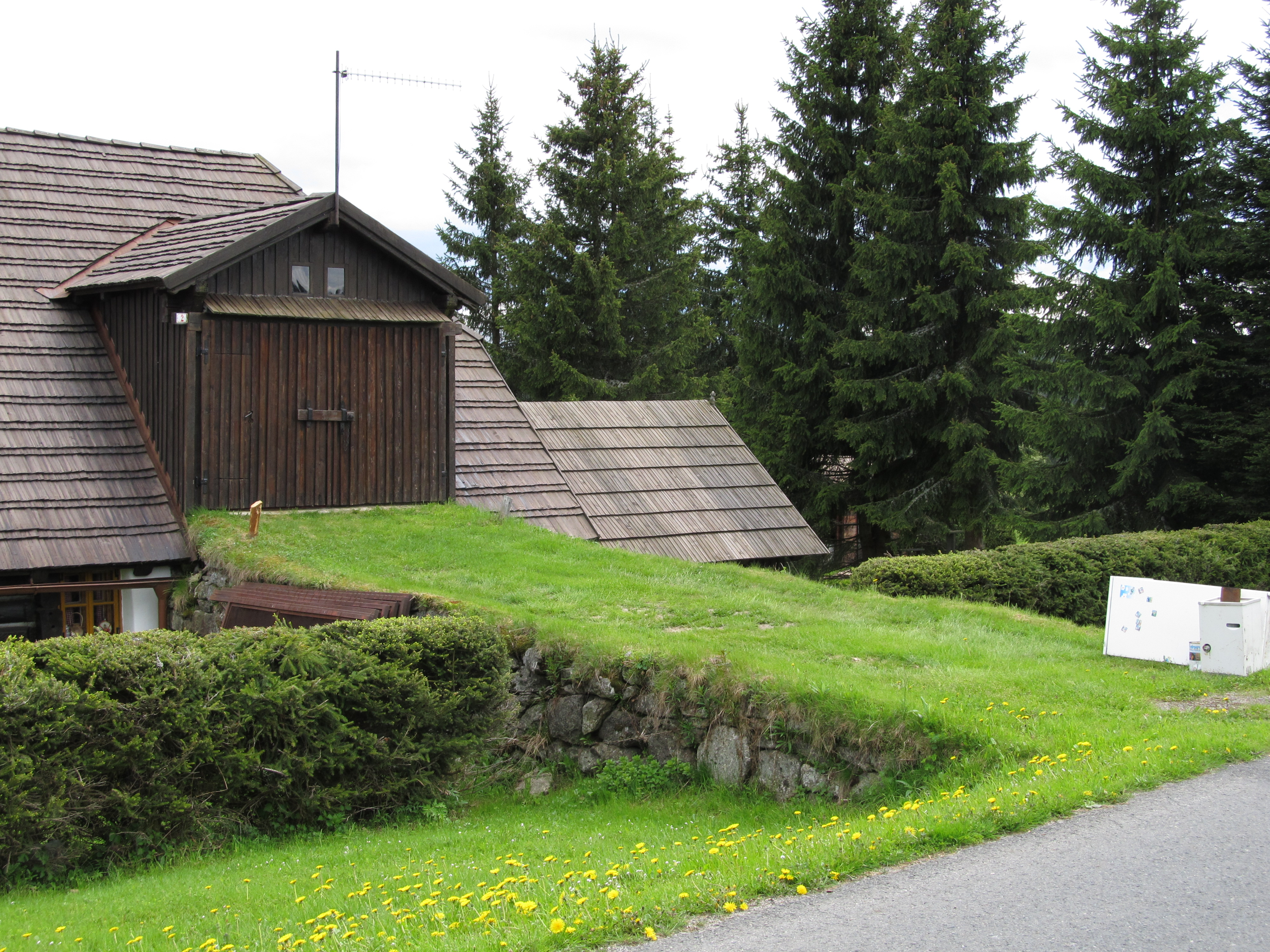 Venkovský dům (Filipova Huť), pův. čp. 16 2, Filipova Huť